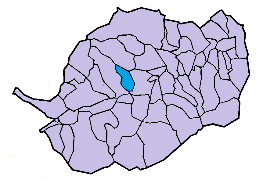 Jújols en el Conflent, a partir del mapa municipal del Conflent de lliure disposició adaptat al Nomenclàtor toponímic aprovat el 2007